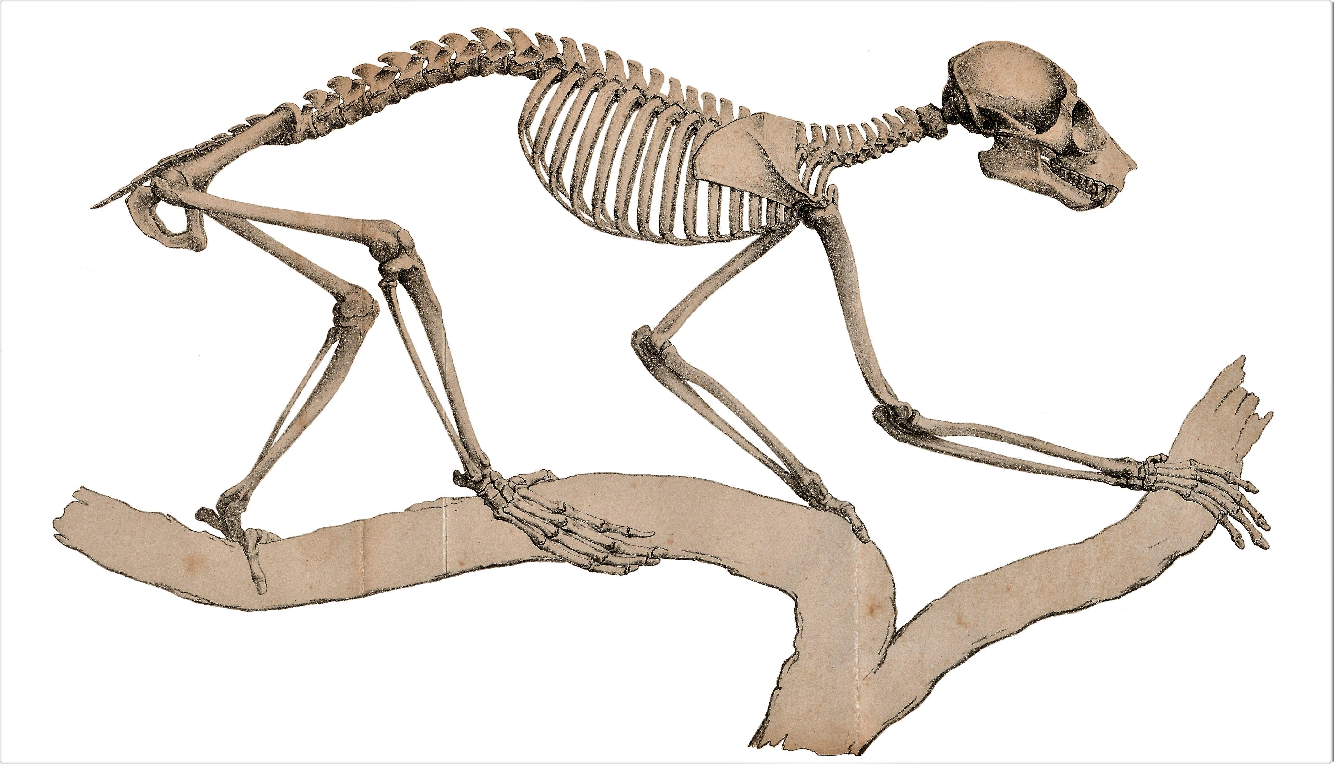 Sunda slow loris skeleton